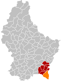 Localisatioun vun der neier Gemeng Schengen